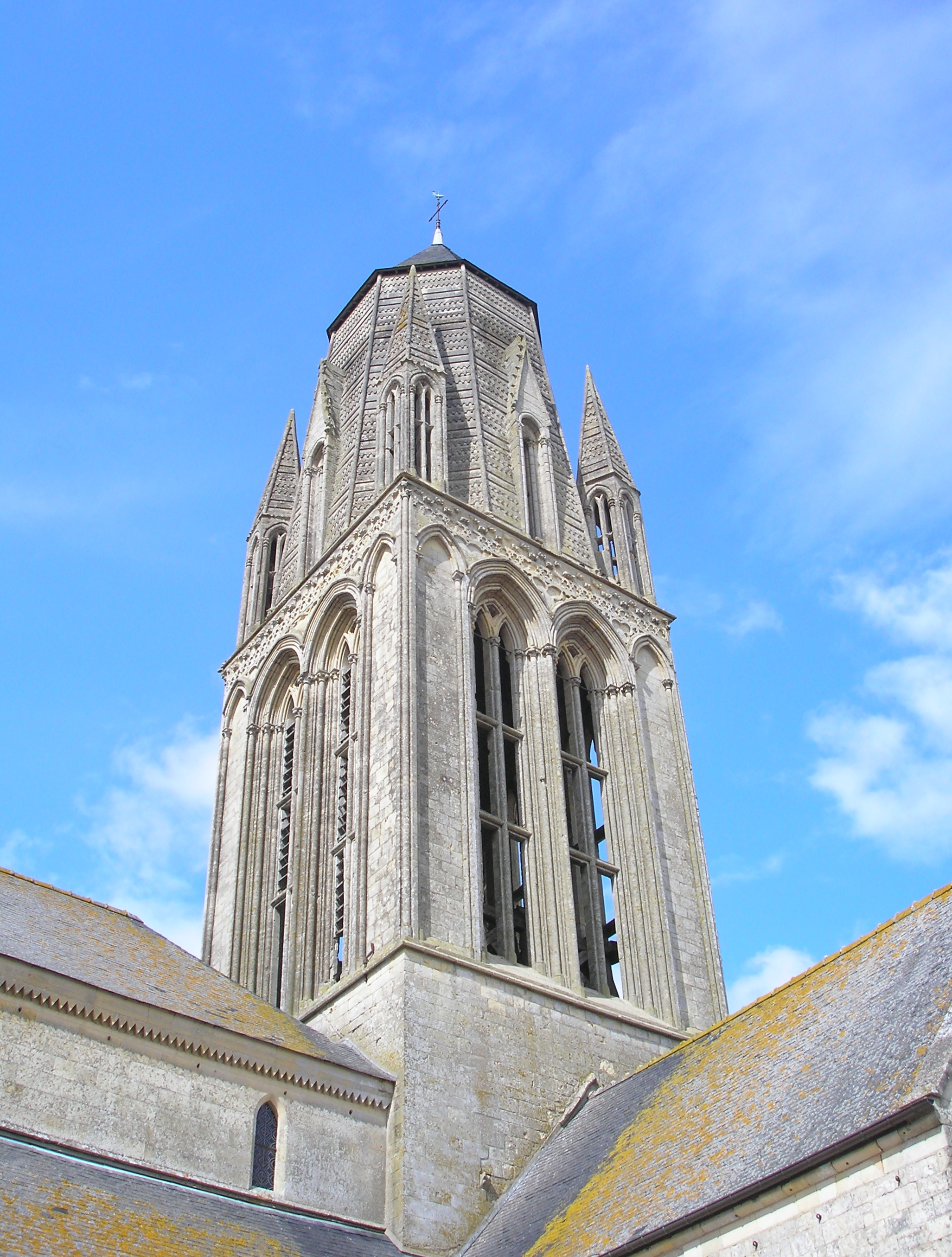 Audrieu (Normandie, France). Tour de l'église Notre-Dame.